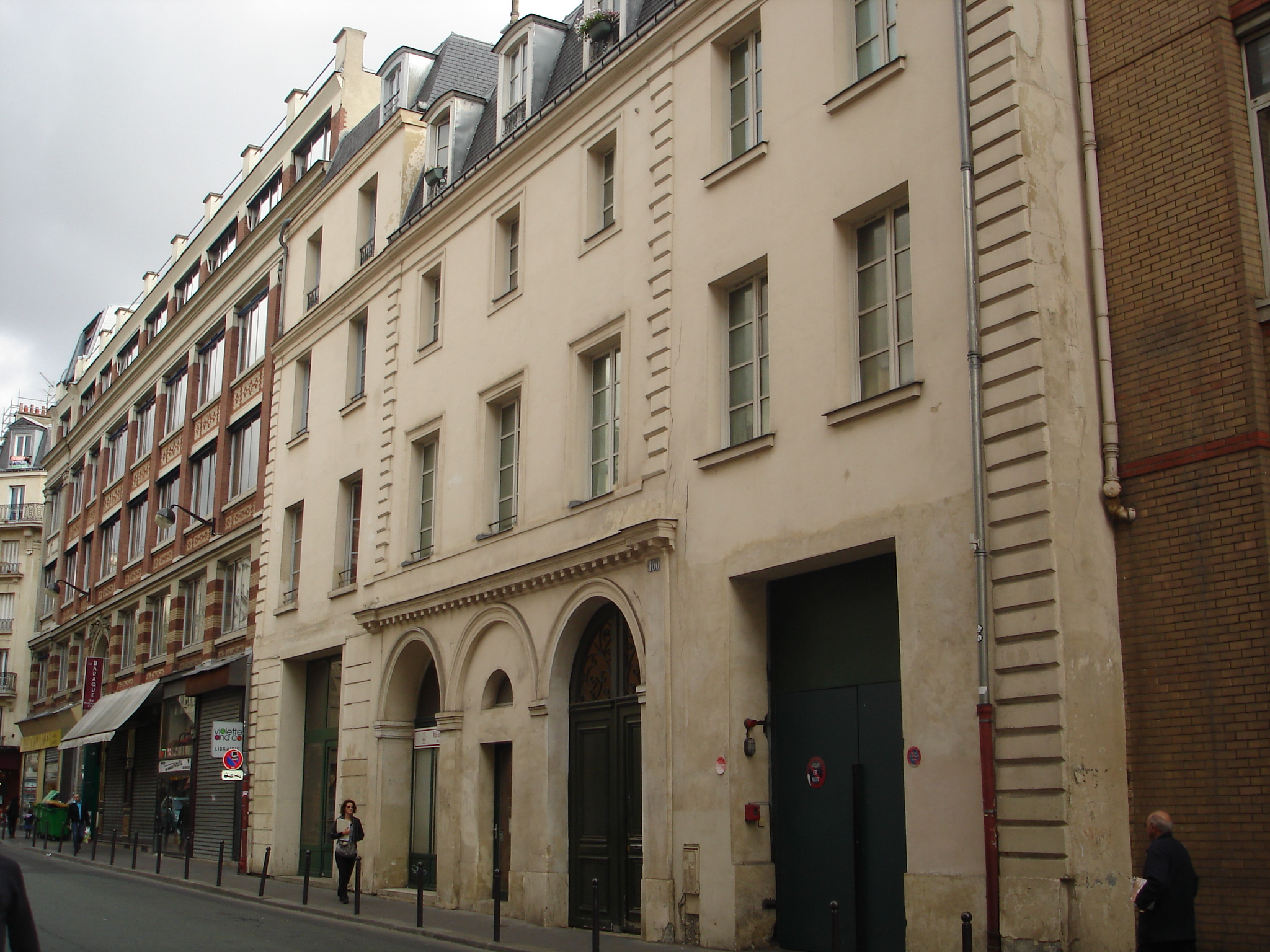 Ancien couvent de la Madeleine de Traisnel, 100 rue de Charonne, Paris 11e